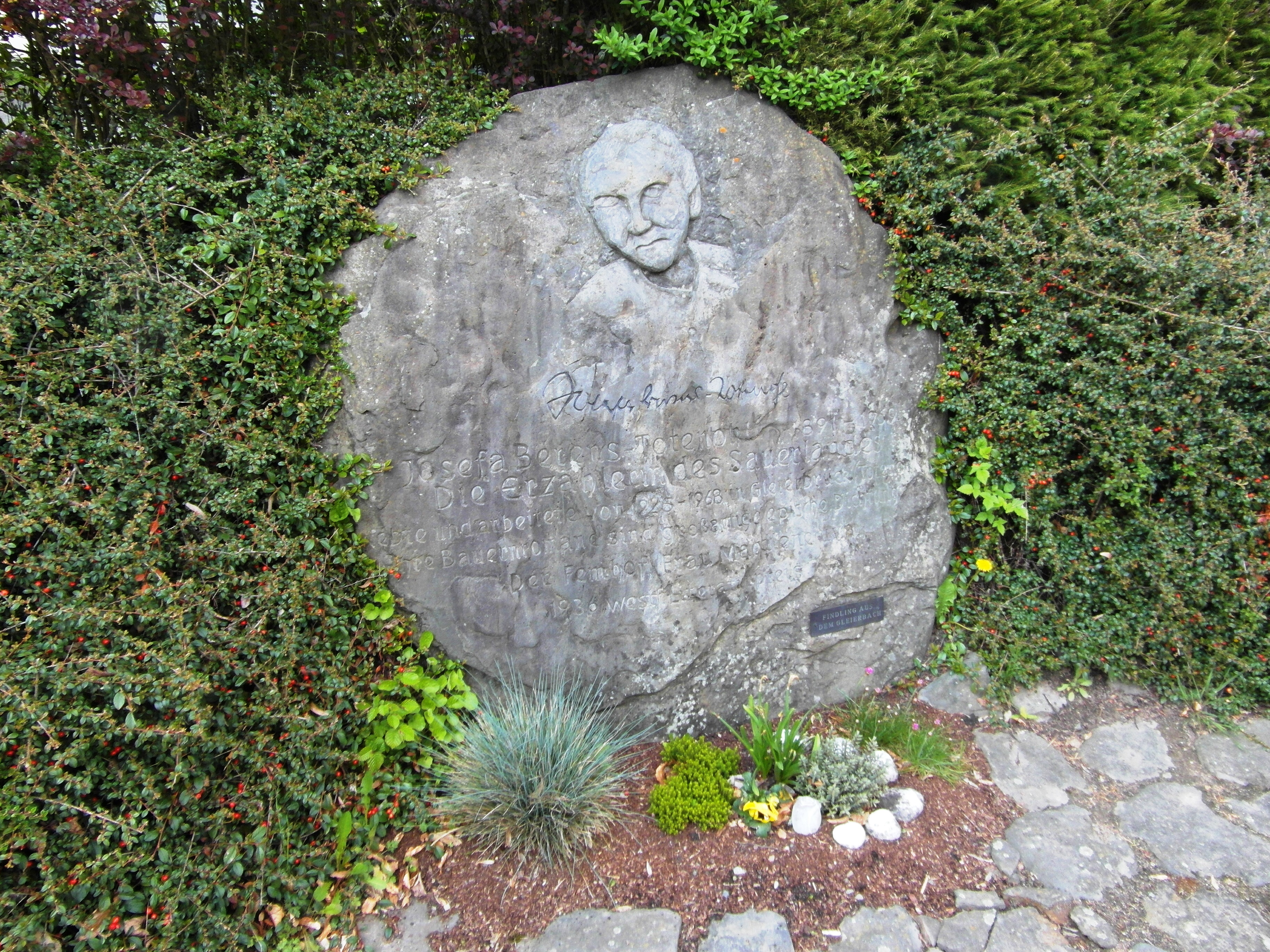 Die stark verwitterte Inschrift enthält Lebensdaten der Dichterin und den Hinweis "Die Erzählerin des Sauerlandes lebte und arbeitete von 1925 bis 1968 in Gleierbrück.Ihre Bauernromane sind großartige epische Dichtung-1936 Westfälischer Literaturpreis.(Der Gedenkstein ist wegen der Nähe der Dichterin zur NS-Ideologie umstritten)